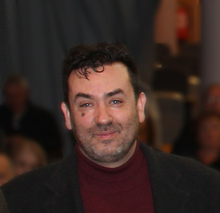 El escritor Javier Menéndez Llamazares en la presentación de su libro 'Palabras que no cambiarán el mundo', en el Ateneo de Santander, 7 de febrero de 2018